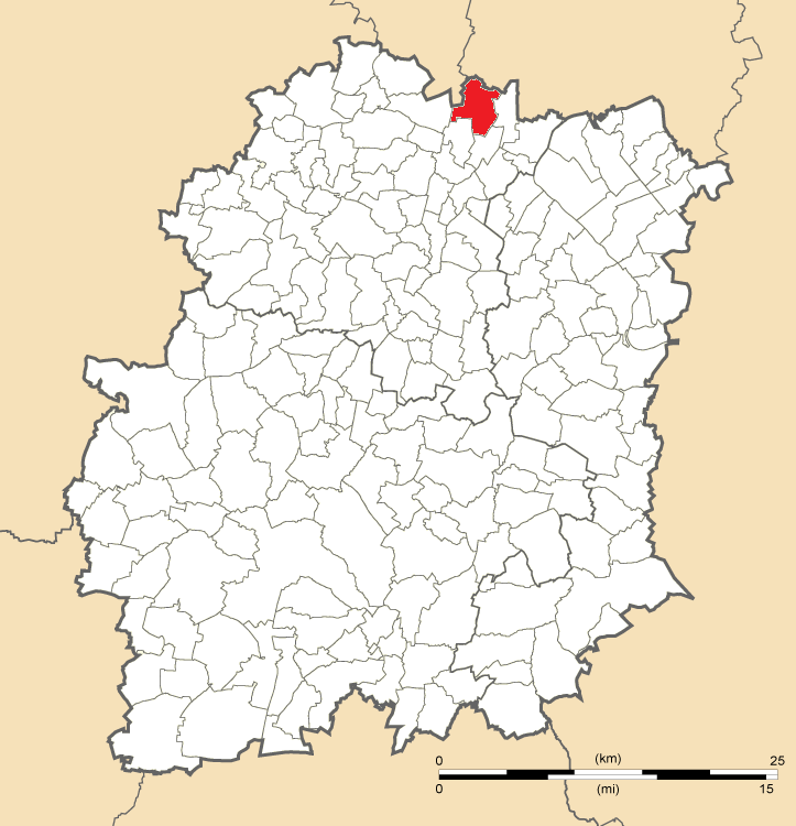 Carte de position de Wissous en Essonne